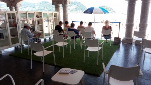 Eguzkiteka, Donostiako Kontxa hondartzako liburutegia